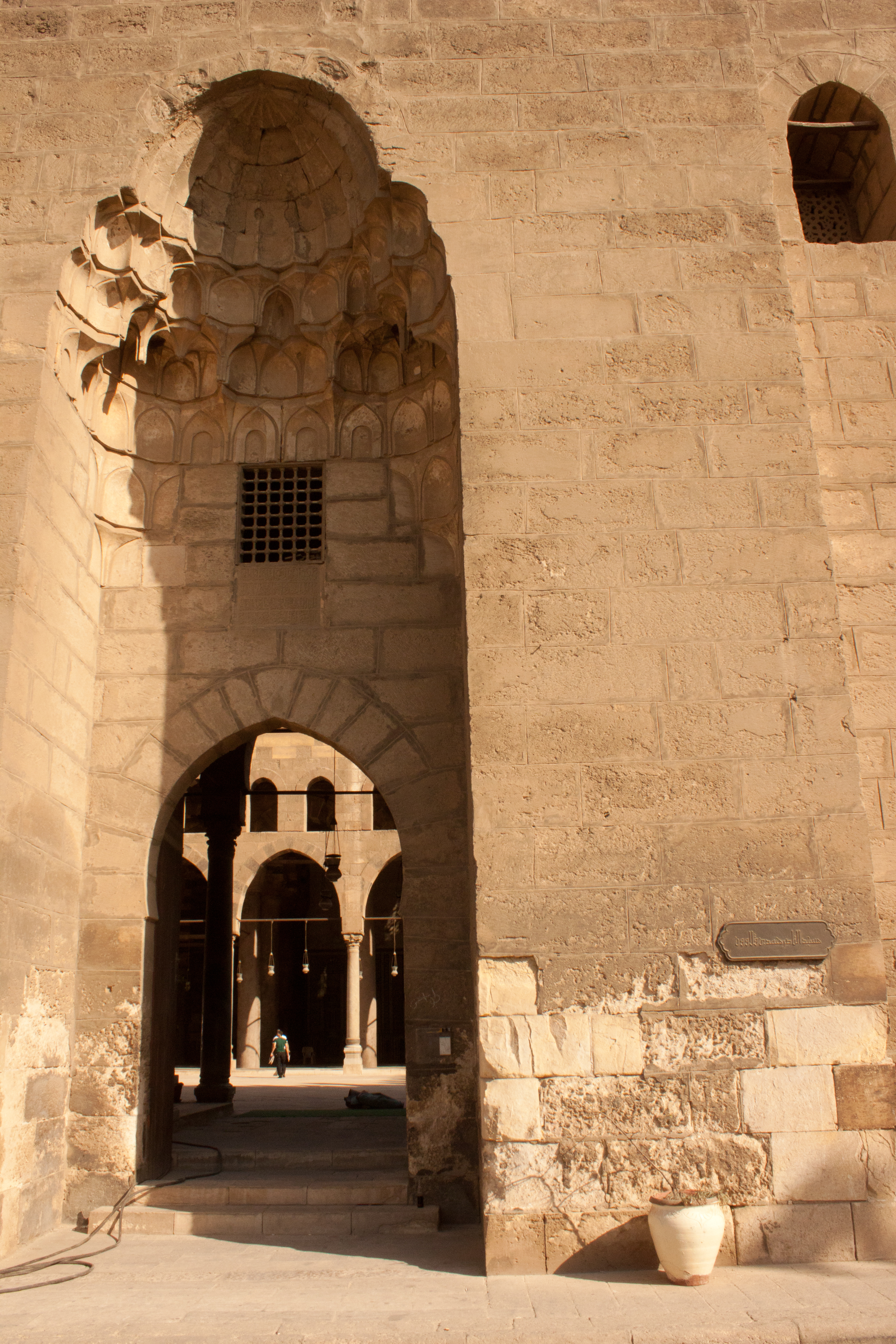 مسجد قلاون ، قلعة صلاح الدين